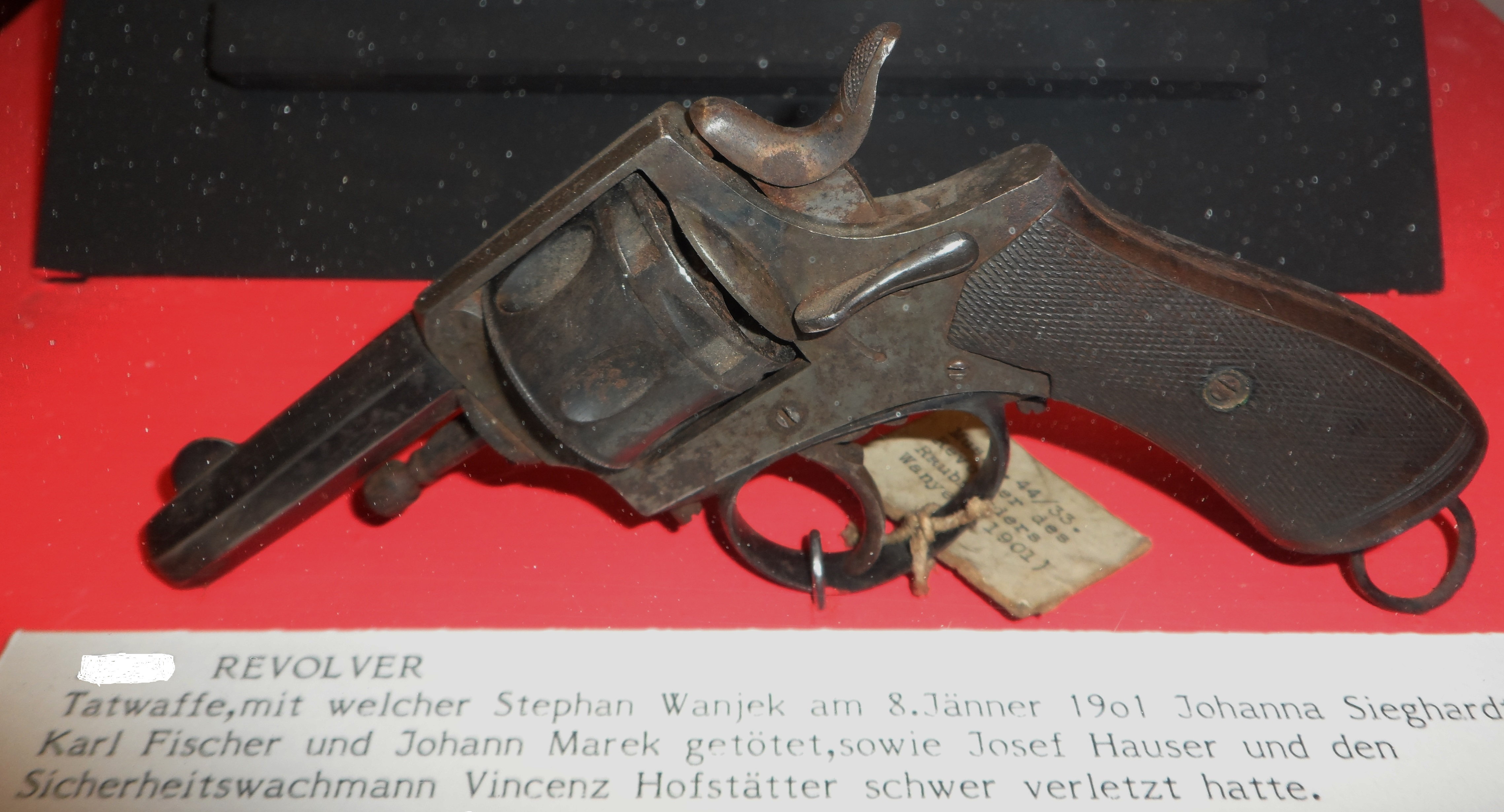 Revolver, Tatwaffe eines Dreifachmordes von 1901, Kriminalmuseum Wien